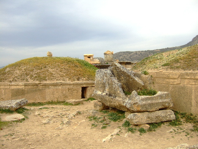 Hierapolis: Tumulus (Nr. 51) aus dem 1. Jahrhundert n. Chr. in der Nekropole - davor ein zerstörter Steinsarkophag